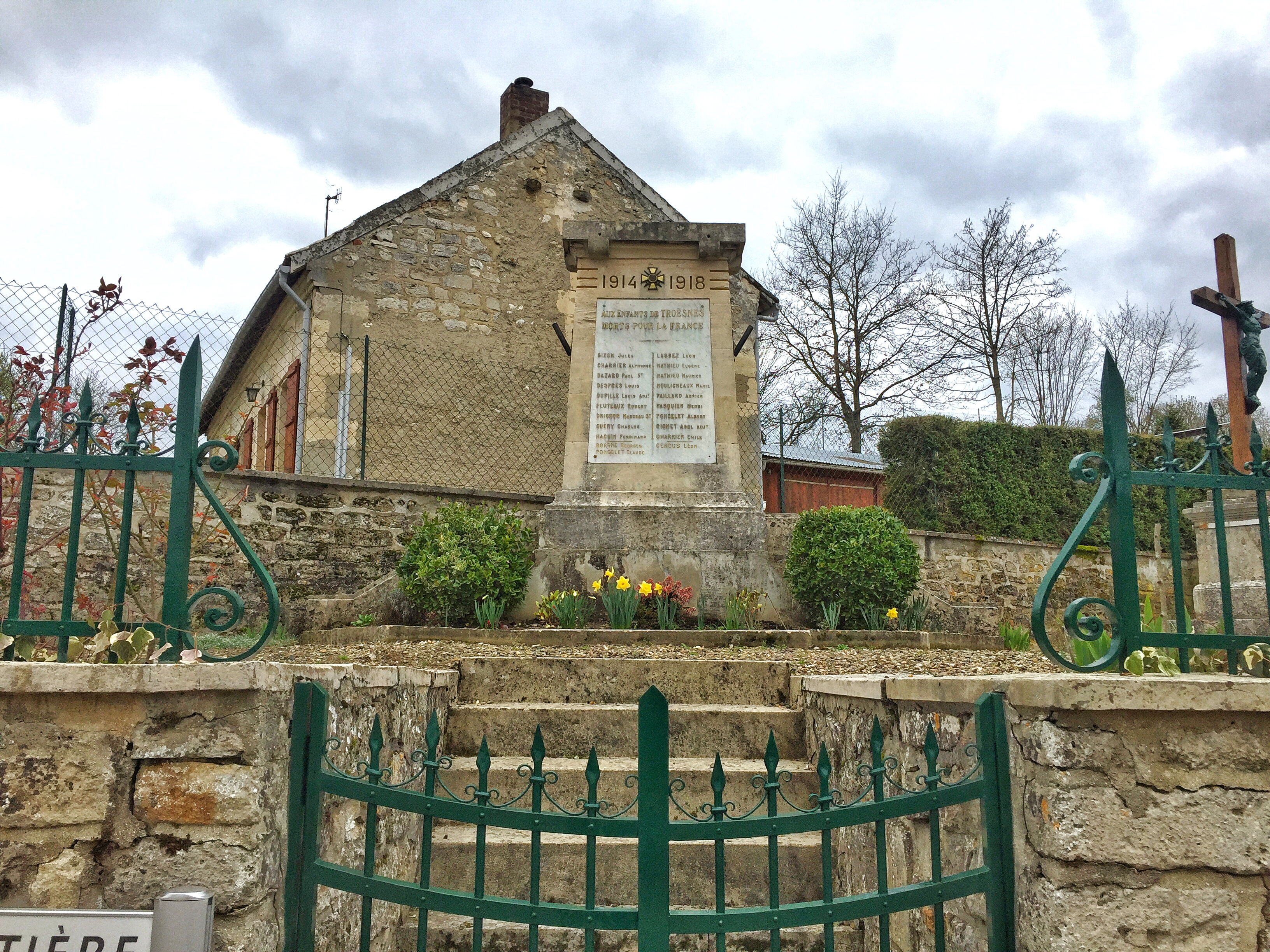 Photo du Monuments aux mort, situé en face de la mairie.